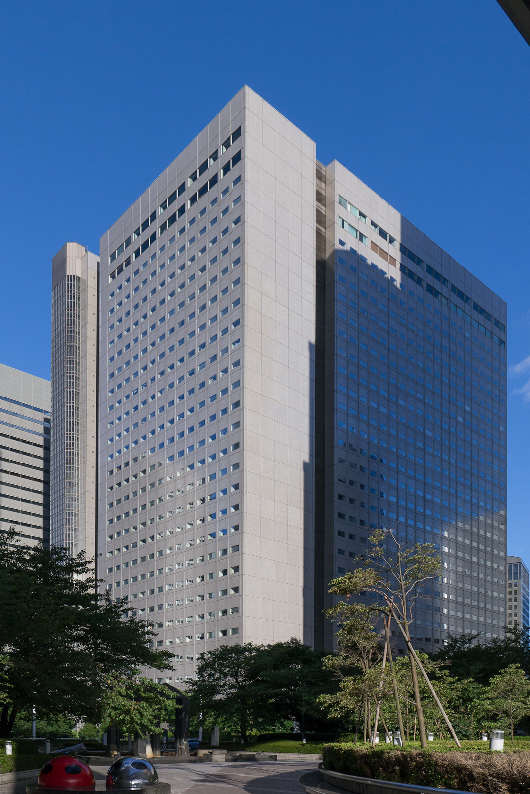 新宿NSビル、東京都新宿区西新宿。